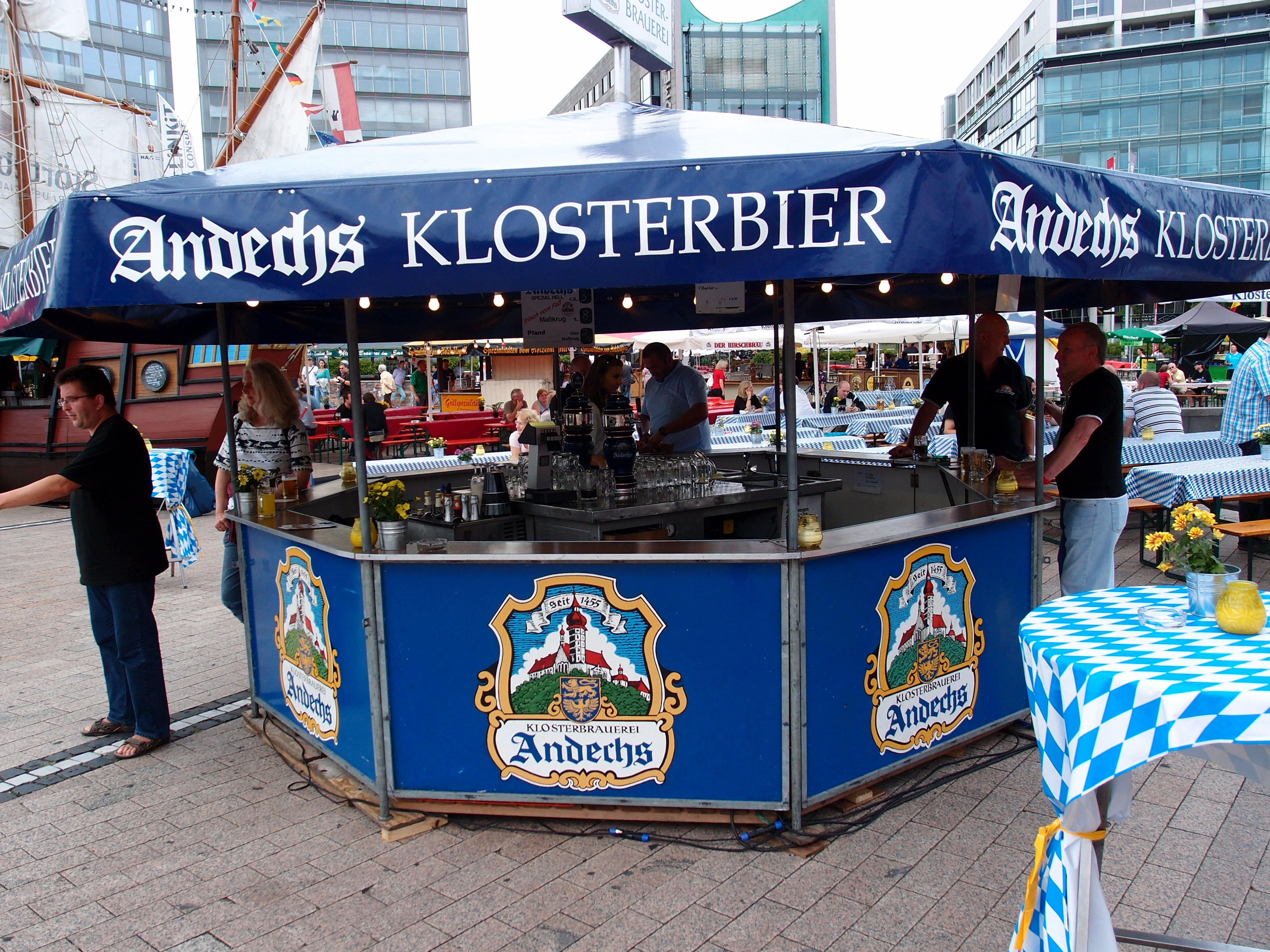 Kölner Bierbörse (August 2012), Mediapark (Andechser Klosterbier) Datum: 24.08.2012 Urheber: M. Pfeiffer alias Benutzer:Gordito1869 Quelle: privates Fotoarchiv des Urhebers